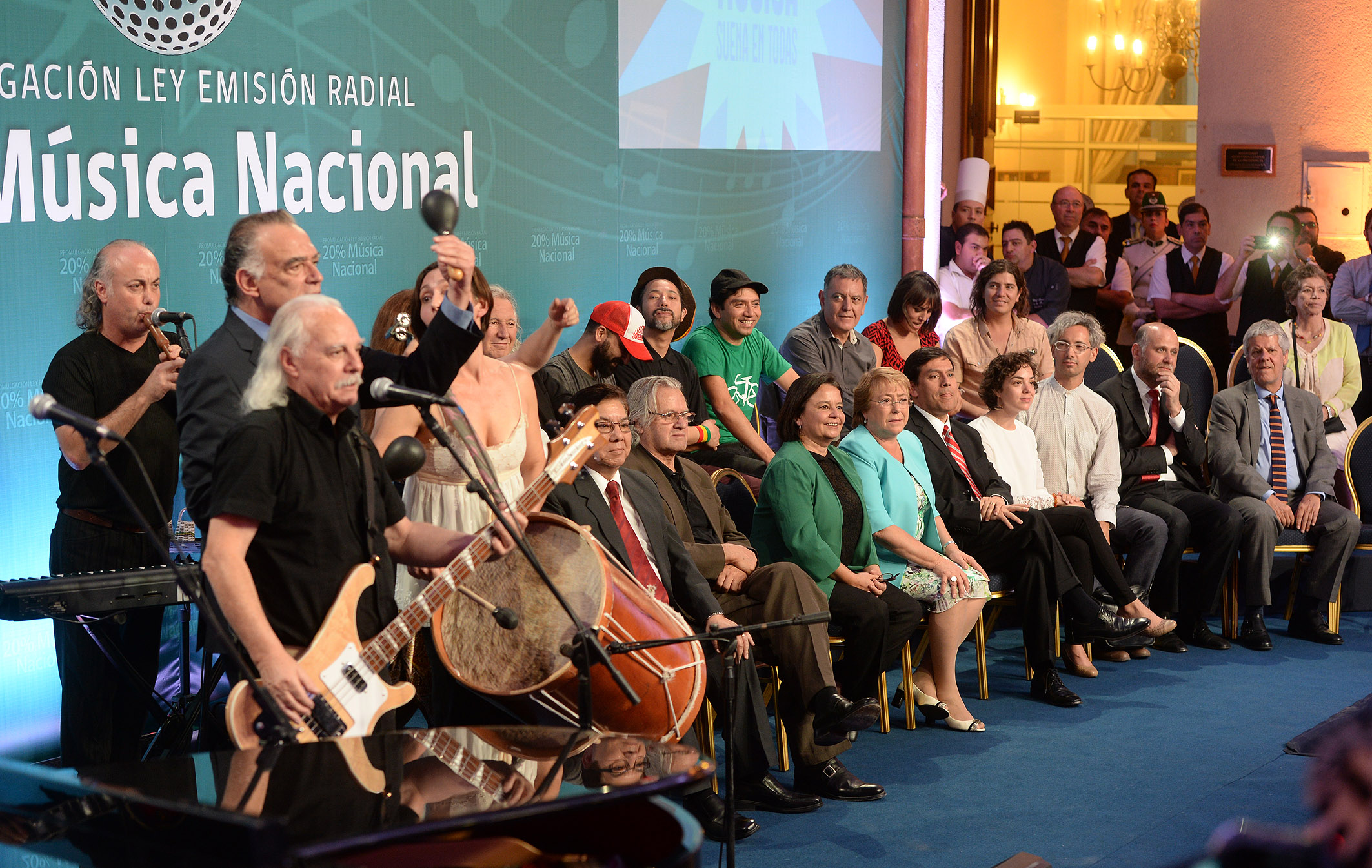 10 DE ABRIL 2015/SANTIAGO Los Jaivas, durante la ceremonia de promulgación de la Ley de Emisión Radial del 20 por ciento de Música Nacional en el Patio de las Camelias del Palacio de La Moneda. Gobierno de Chile